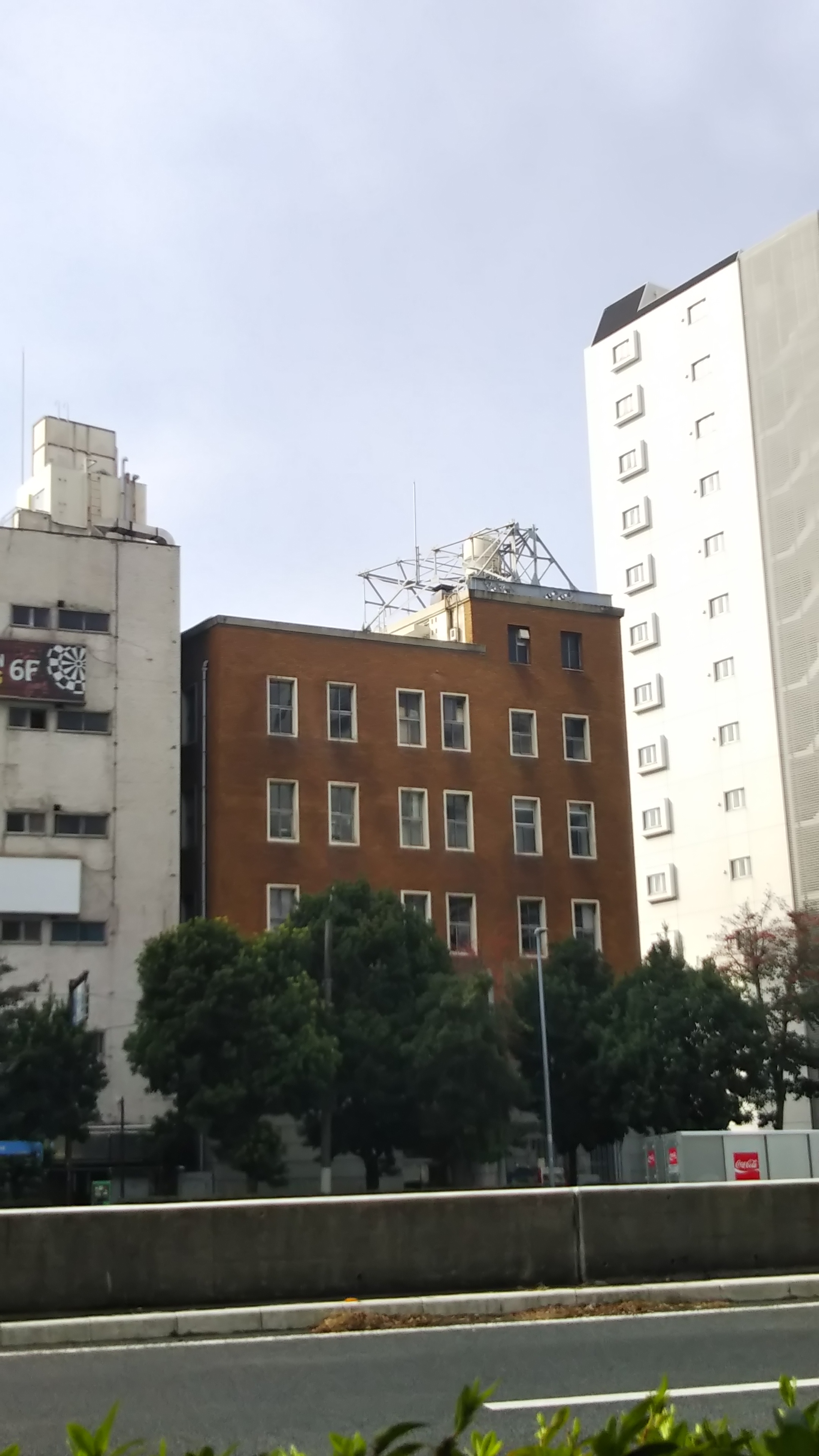 横浜市中区吉田町、都南ビル（旧 都南貯蓄銀行本店）